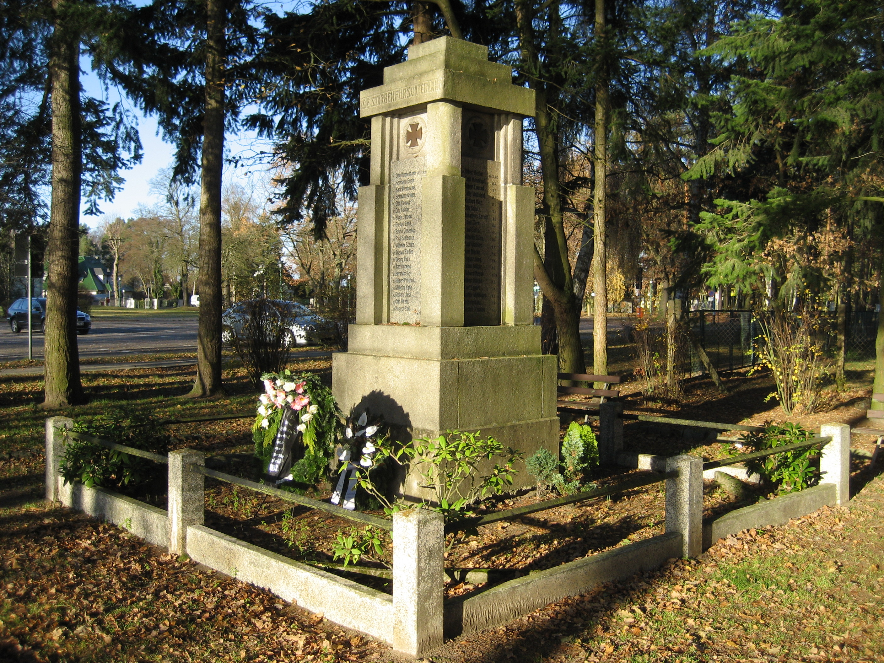 Kriegerdenkmal für die im Ersten Weltkrieg gefallenen 79 Soldaten aus Löcknitz am Löcknitzer See, aus Blickrichtung Südosten.